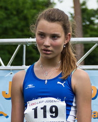 Laufgala des TSV Pfungstadt am 3. Juni 2017.